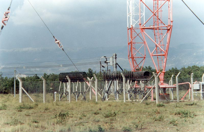 Selfs d'accord des antennes OM